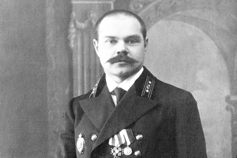 П.Н.Черменский 2